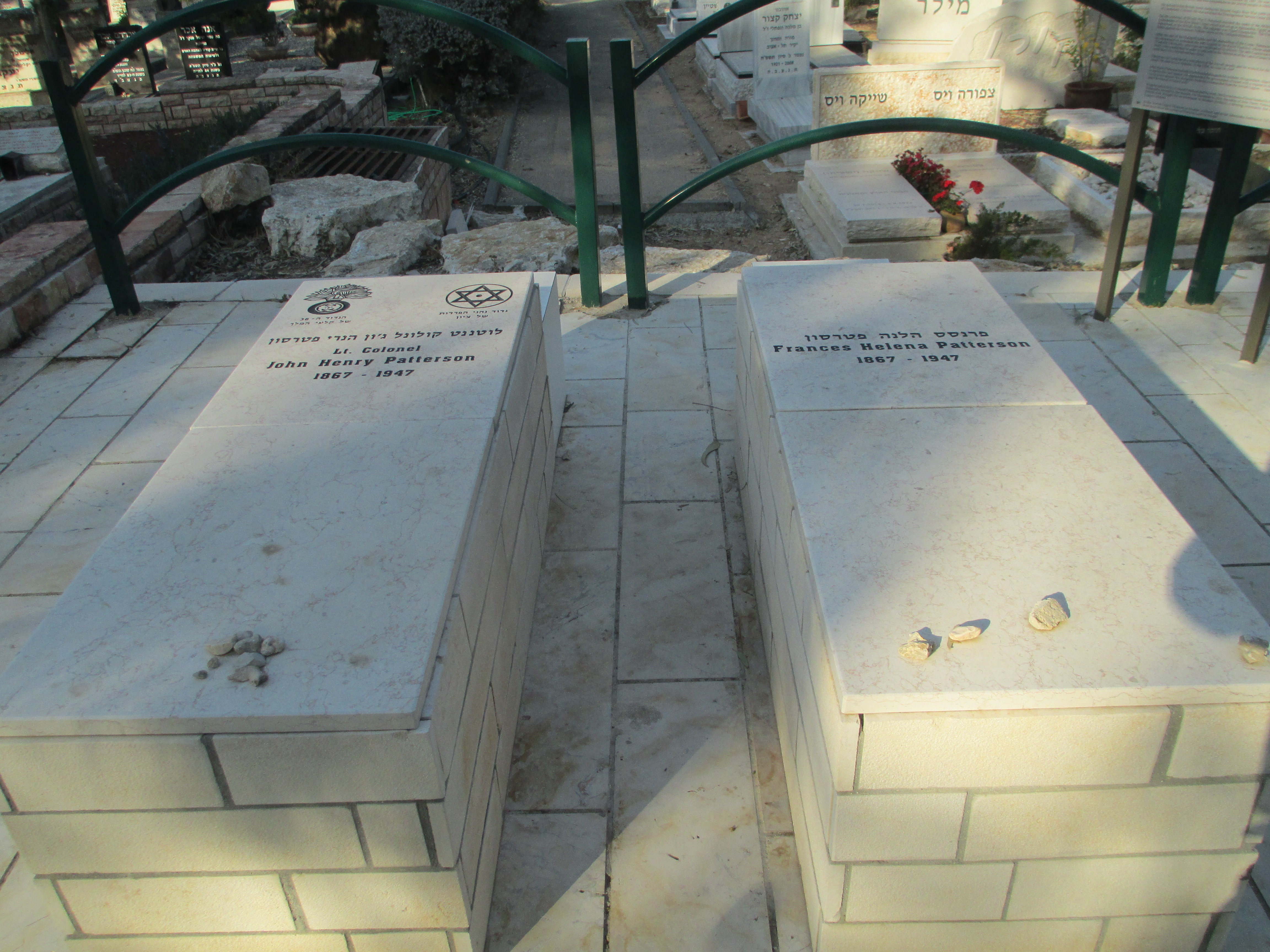 קברי ג'ון והלנה פטרסון באביחיל